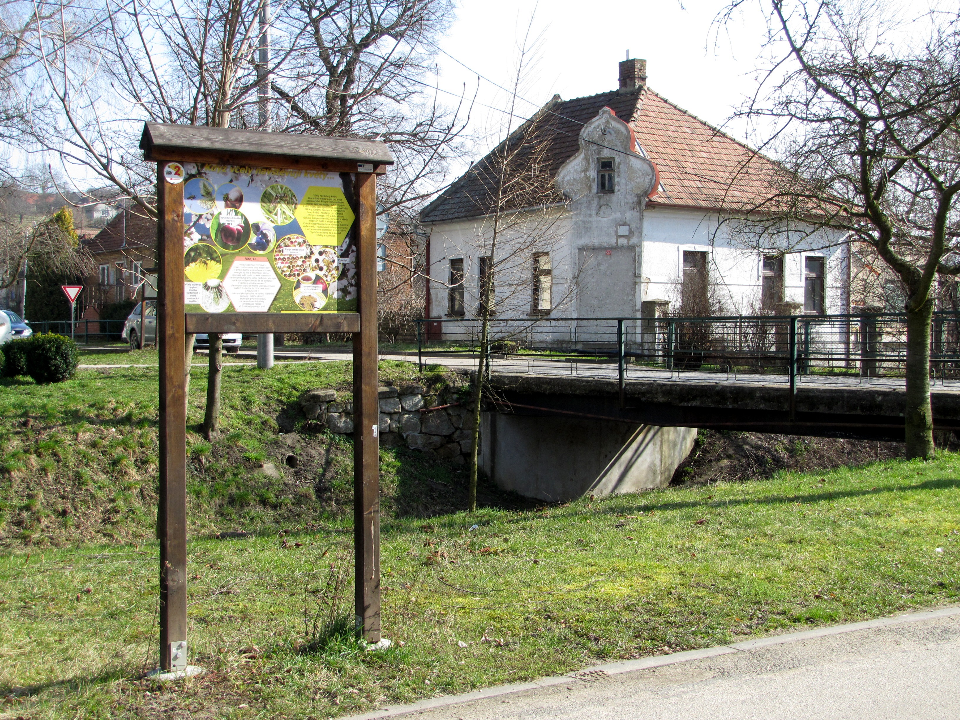 Včelařská naučná stezka v Kyjově - Bohuslavicích, otevřená v roce 2014